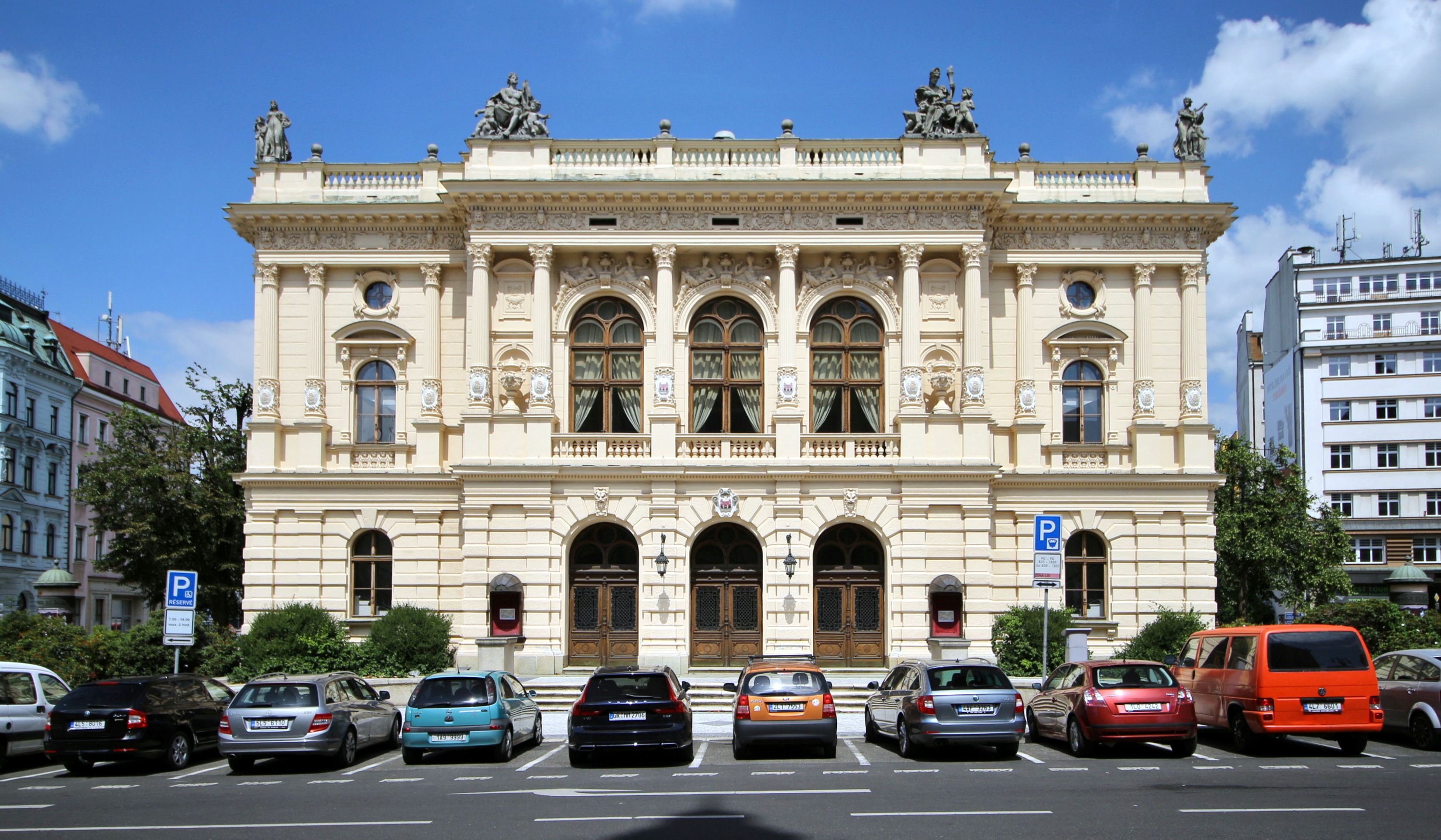 Liberecké Divadlo F. X. Šaldy